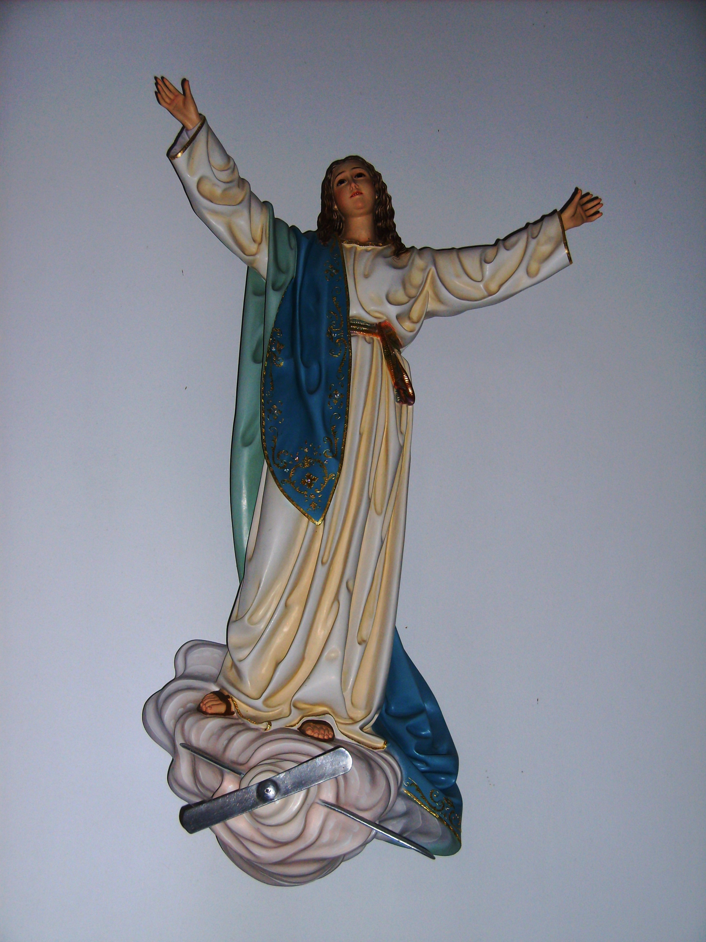 Igreja de Nossa Senhora do Ar, Ilha de Santa Maria (Açores), Portugal.